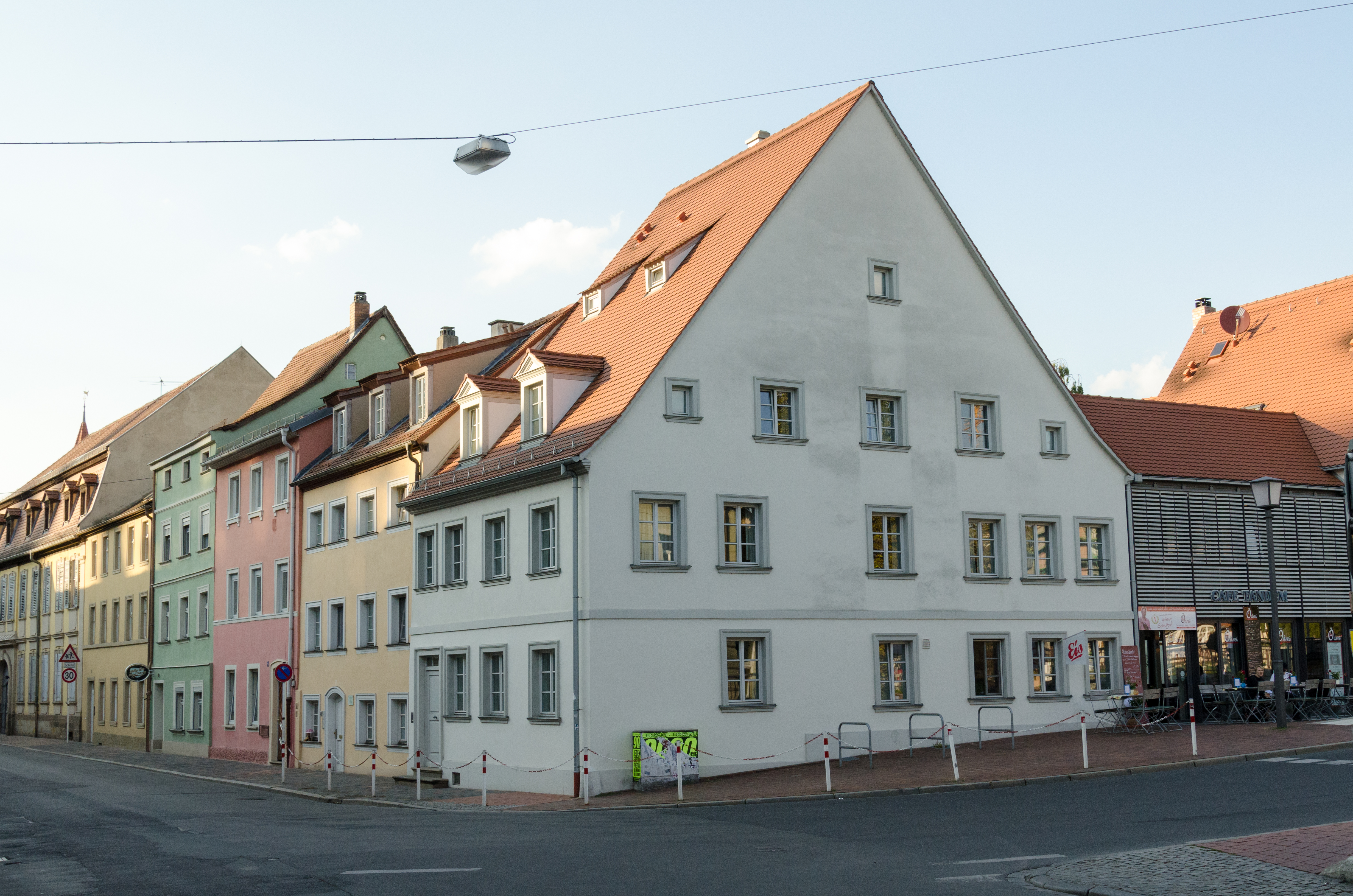 Bamberg, Untere Sandstraße 20, 11. September 2015